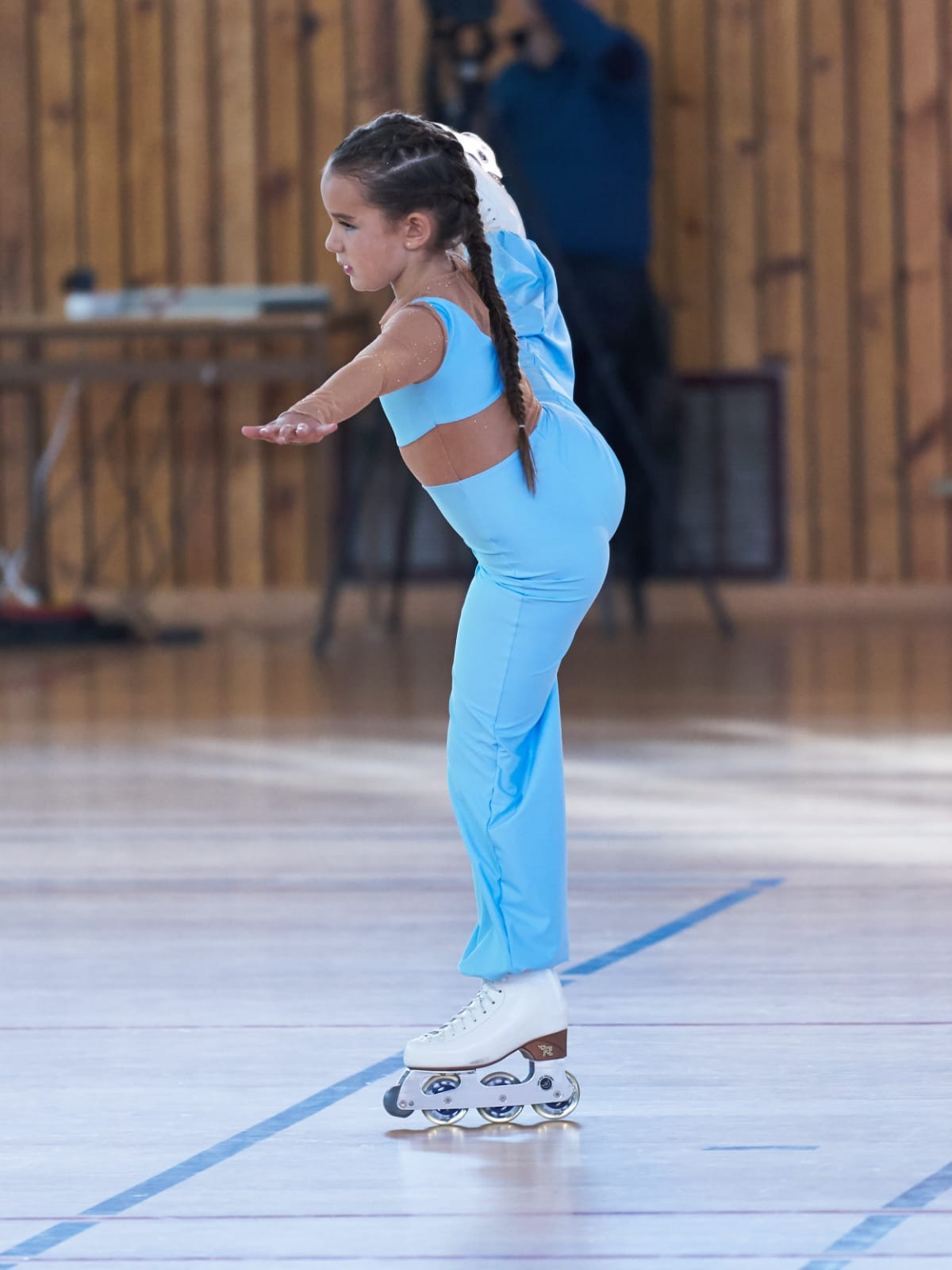 Noa Maciá